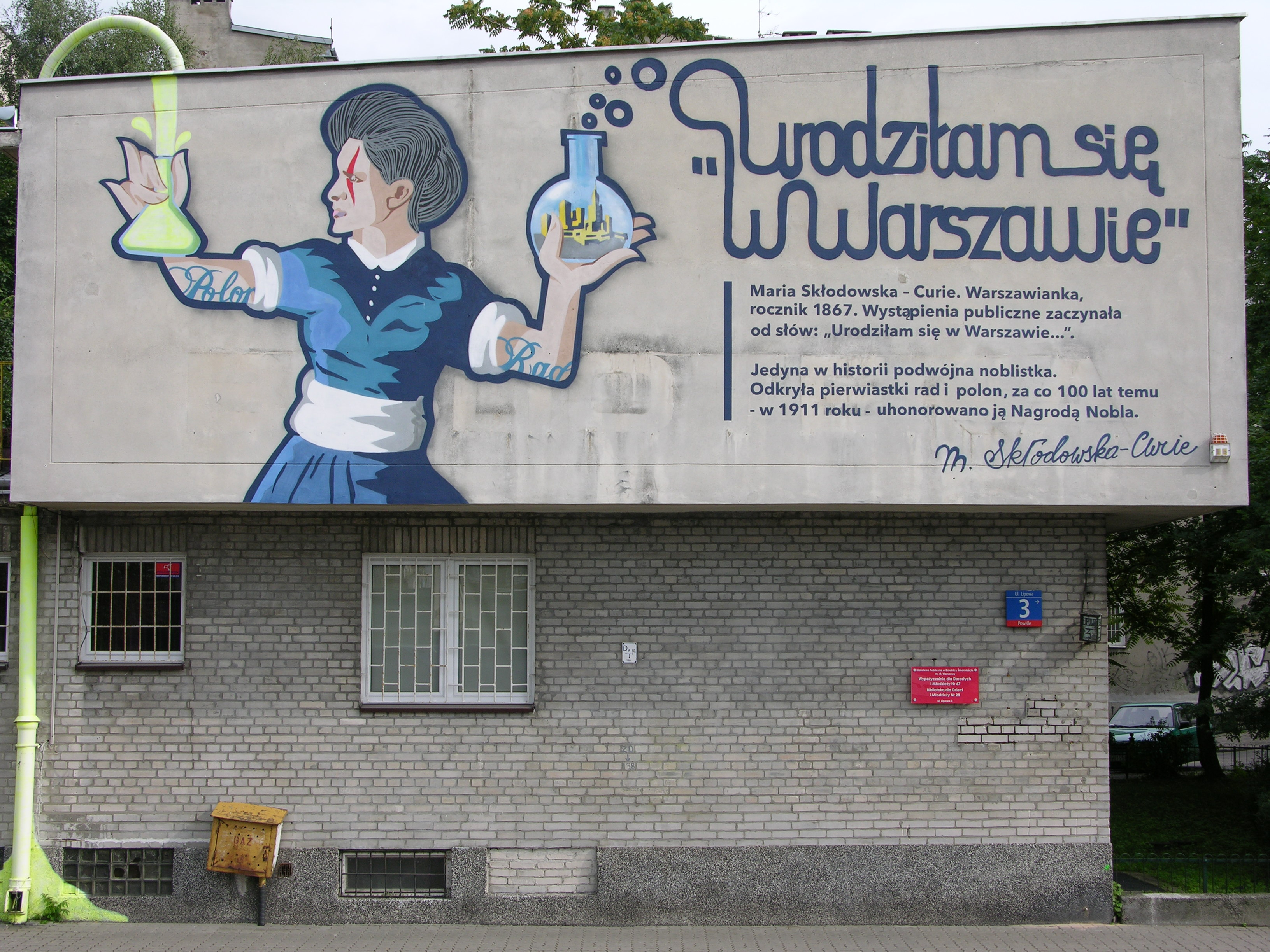 Mural Urodziłam się w Warszawie przy ul. Lipowej 3 w Warszawie